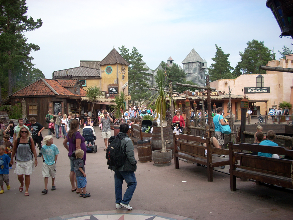 Kaptein Sabeltanns verden, Kristiansand, Norge